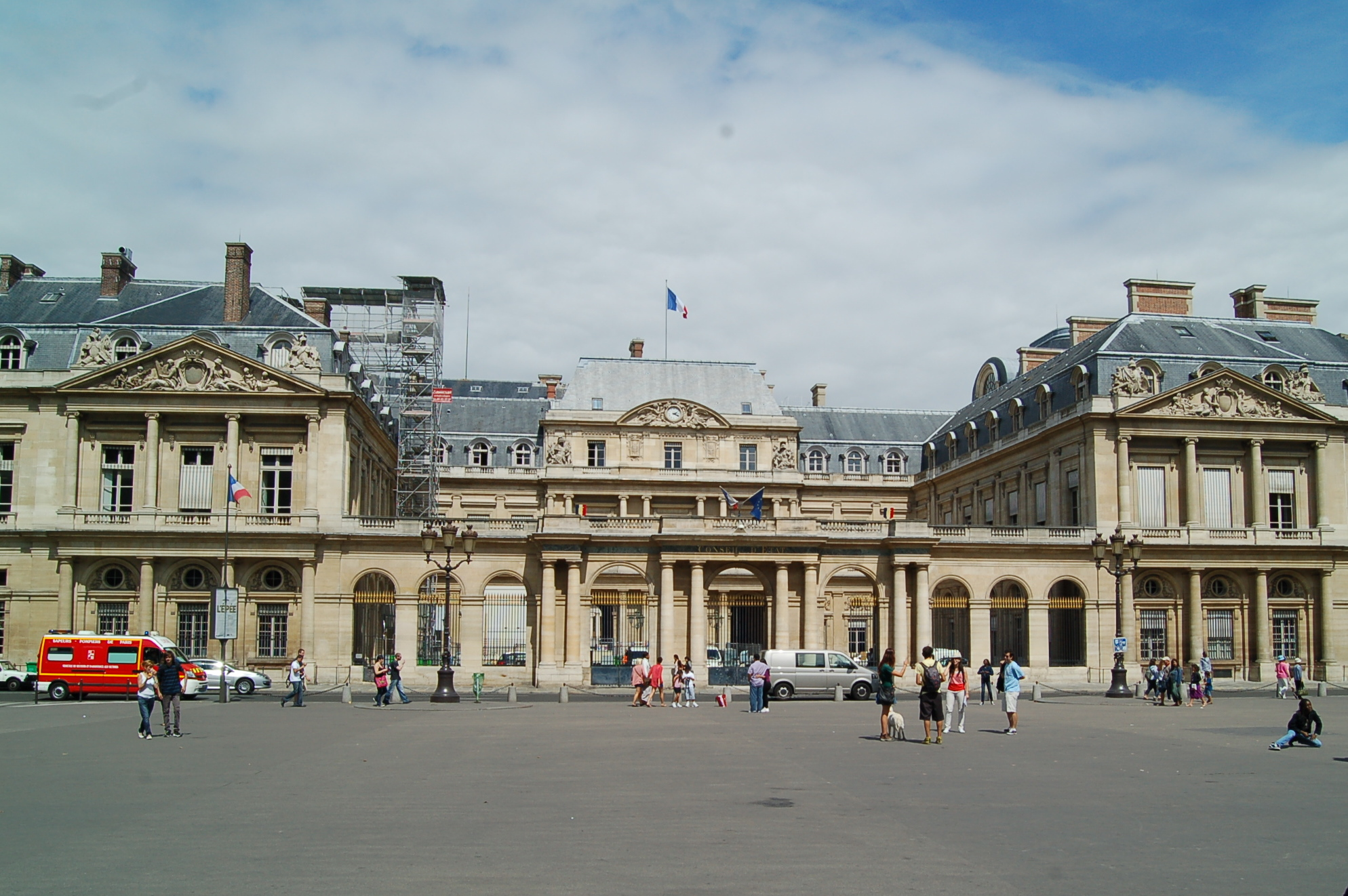 Royal paleis te Parijs 2011